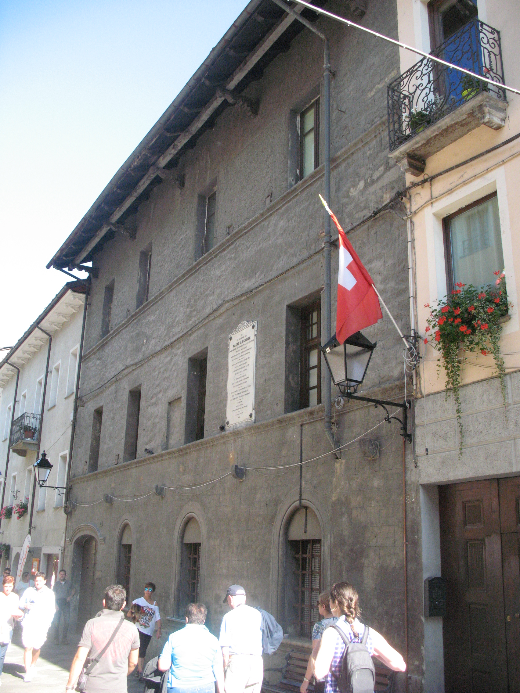 In this medieval building st. Anselm was born in 1033 in Aosta, Italy